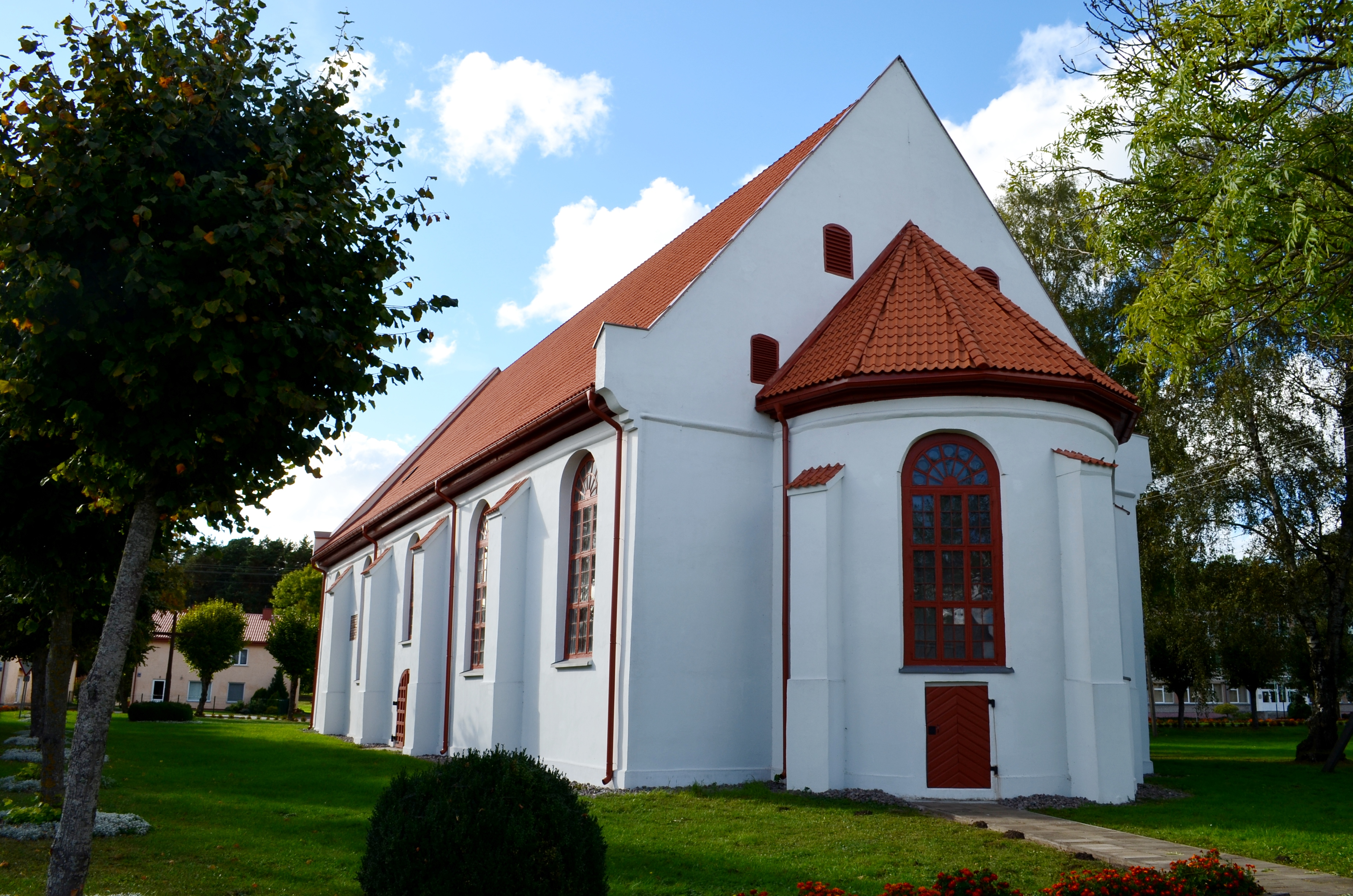 Kintų buv. liuteronų bažnyčia, Šilutės raj.